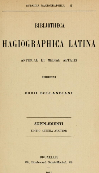 Титульный лист Bibliotheca Hagiographica Latina издания 1911 года